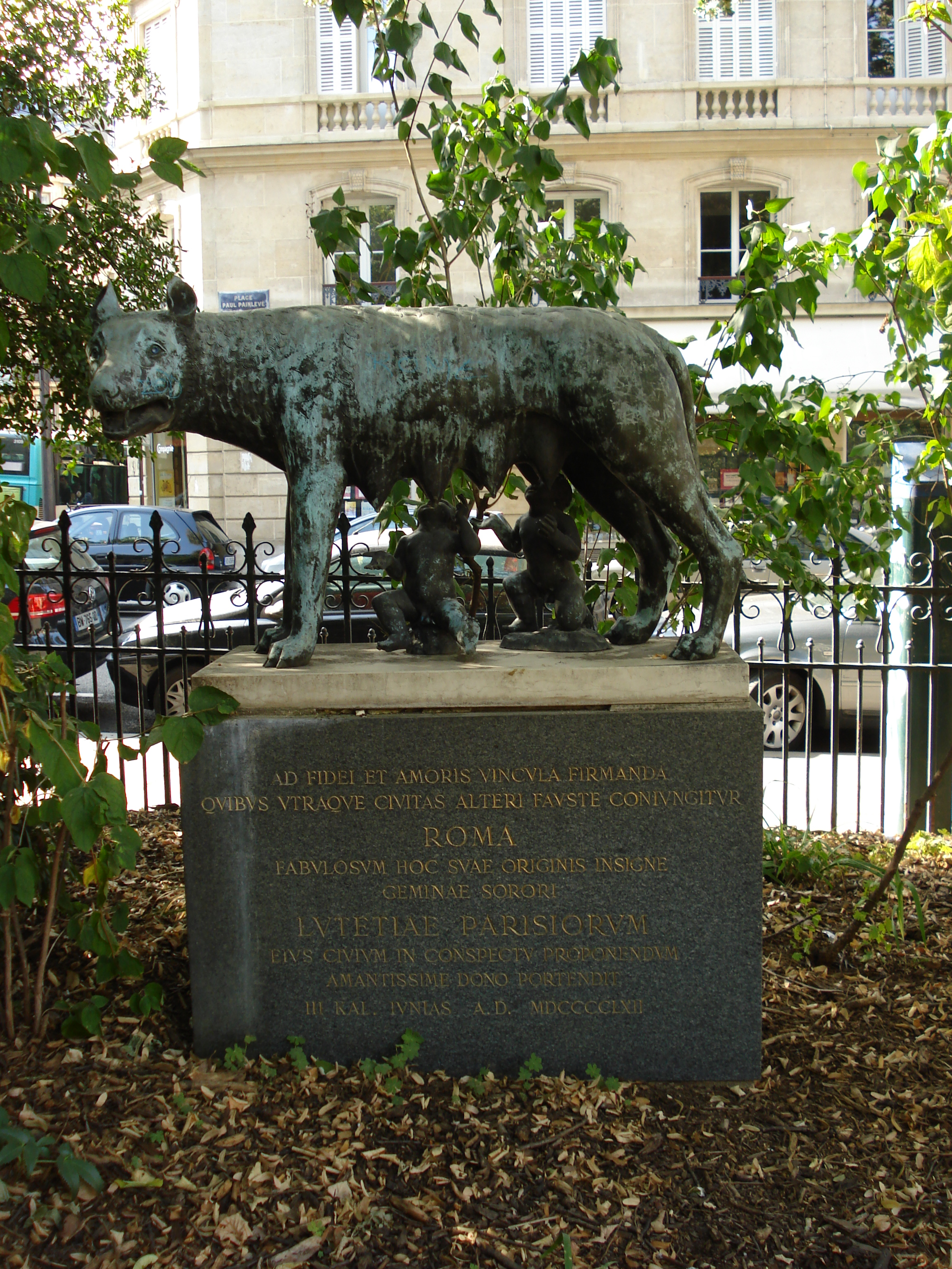 Square Paul-Painlevé (Paris)